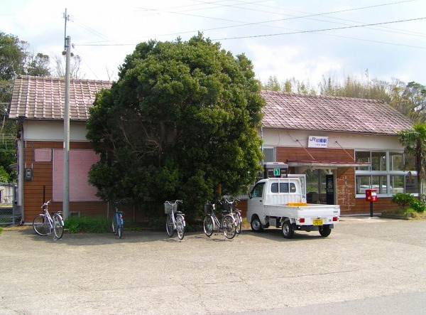 2005/04/03に投稿者が印南駅にて撮影。